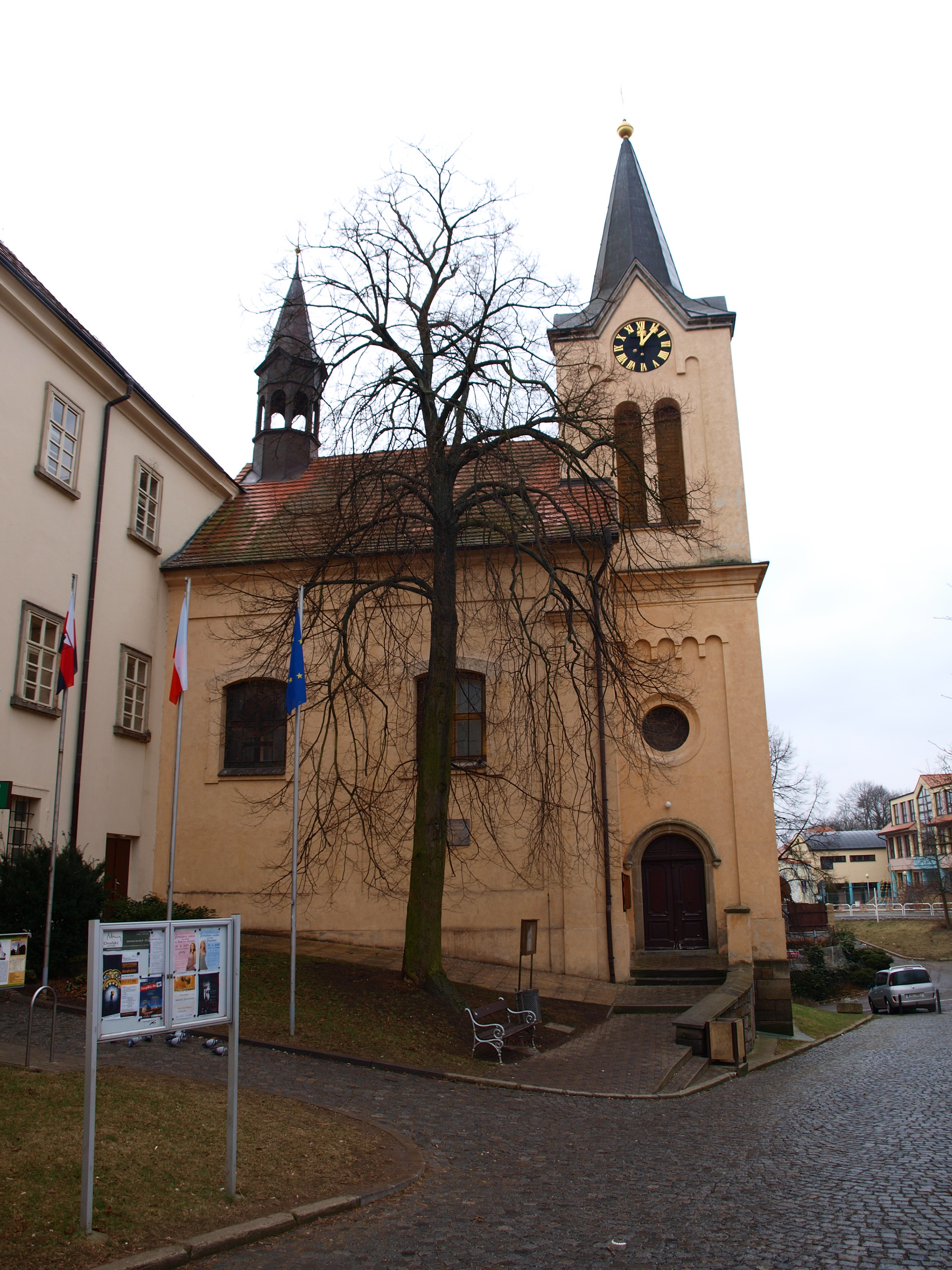 Tvrz Chvaly